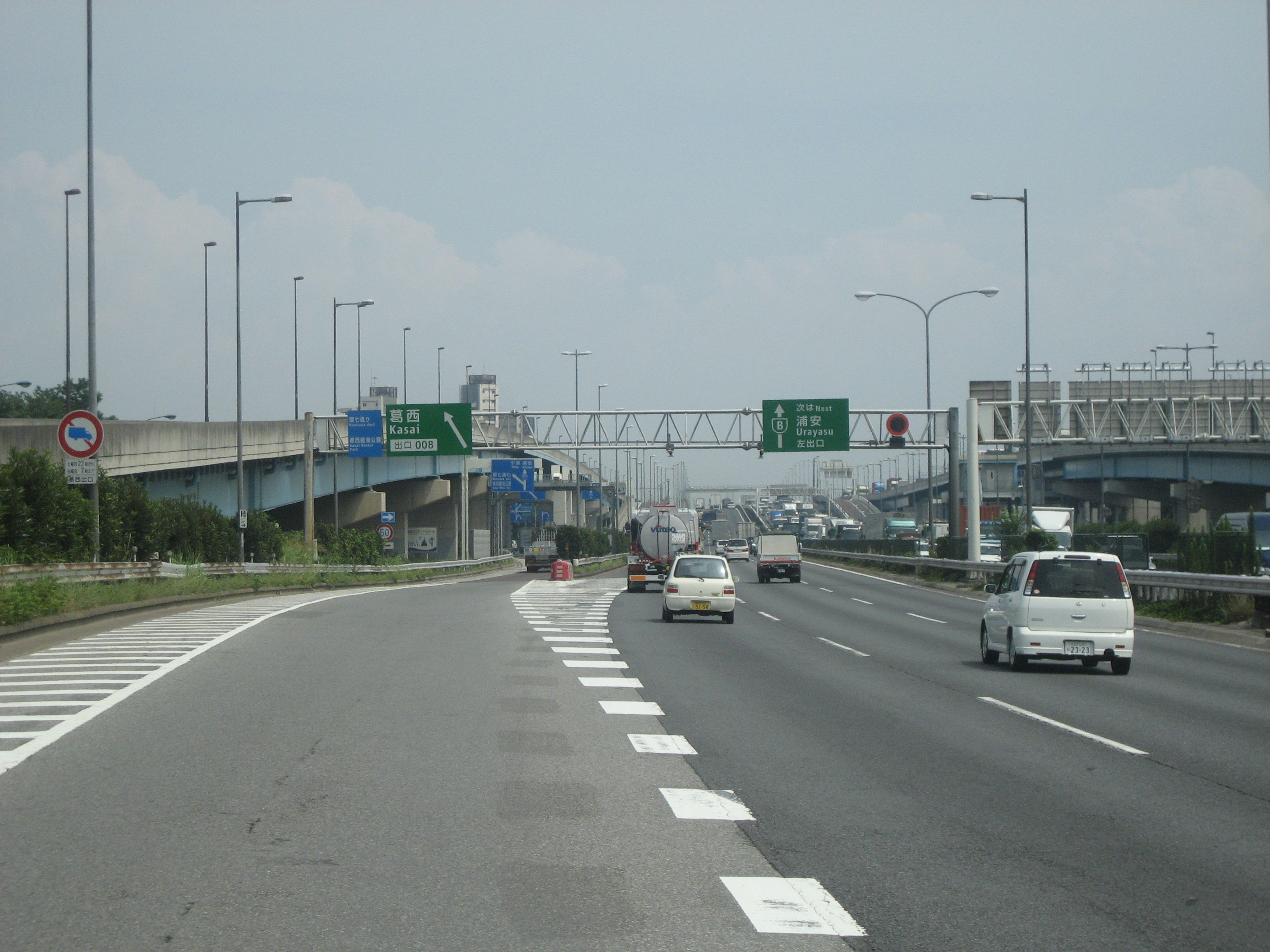 首都高速湾岸線葛西出口